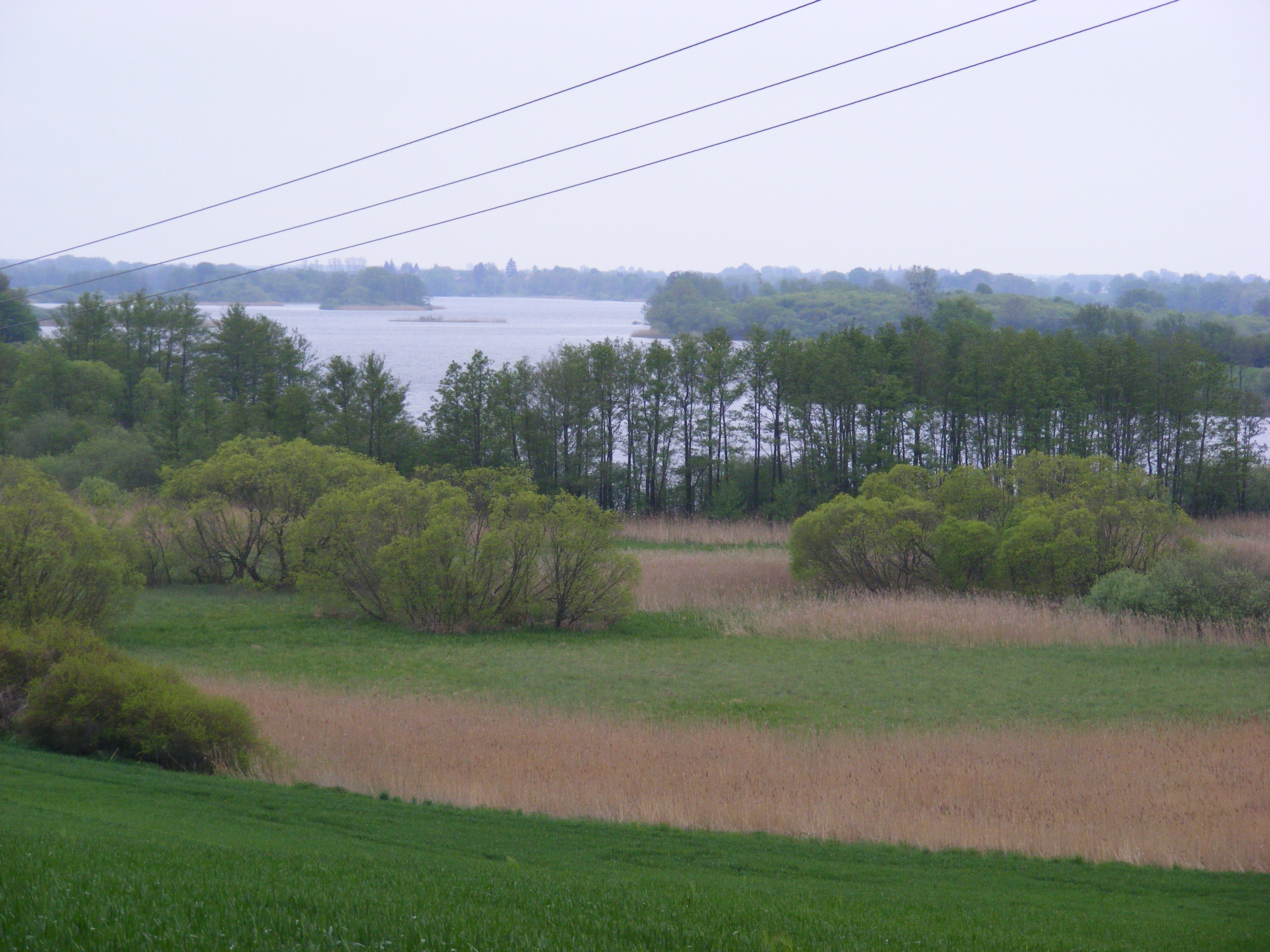 Großer See bei Fürstenwerder (Westl. Uckermark) von Norden (L 25 an der Landesgrenze)